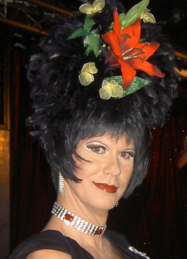 Edith Crepp - Sveriges mest älskade dragqueen